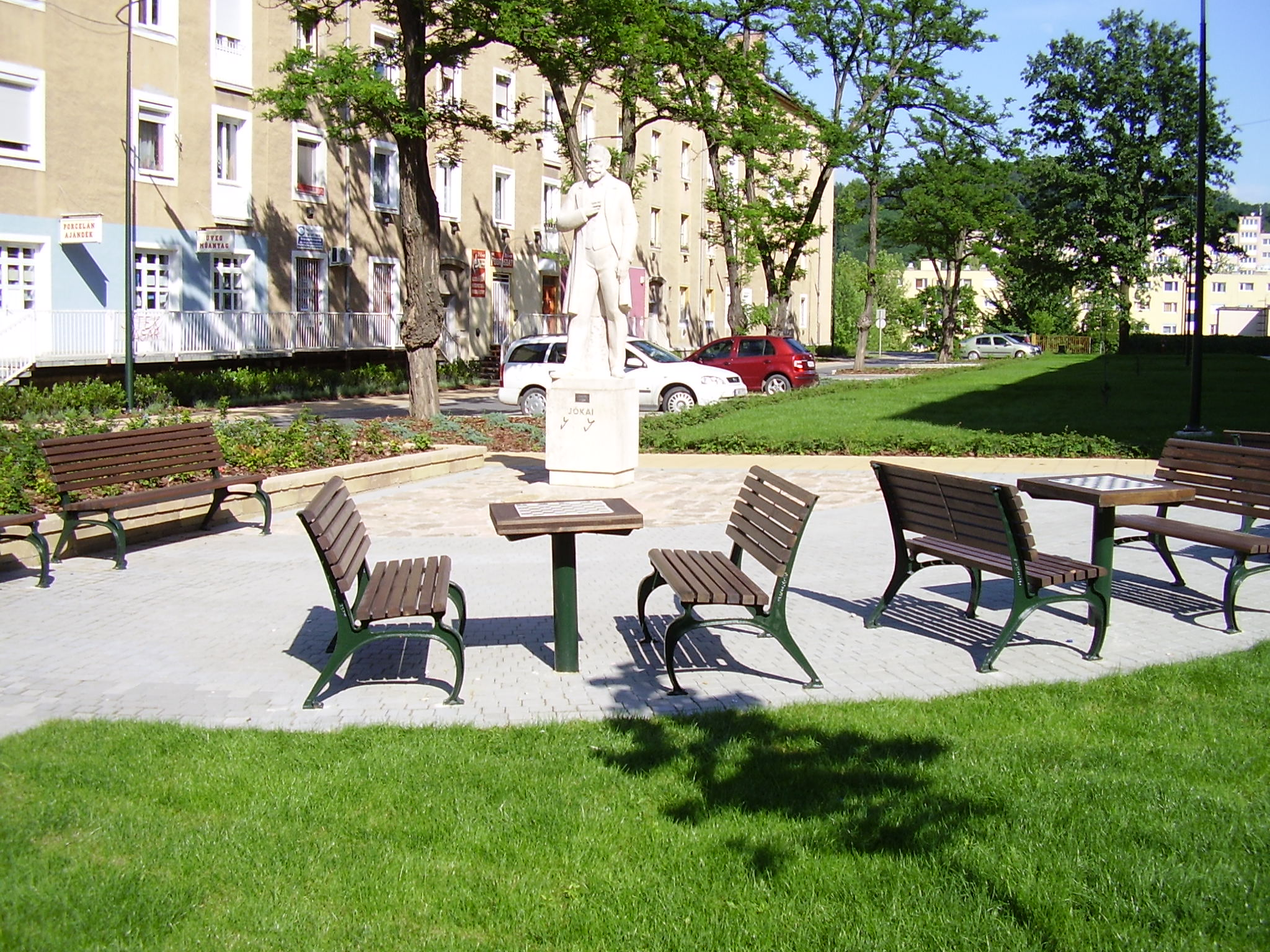 Jókai Mór tér (Kazincbarcika). A szobor Antal Károly alkotása, 1966.